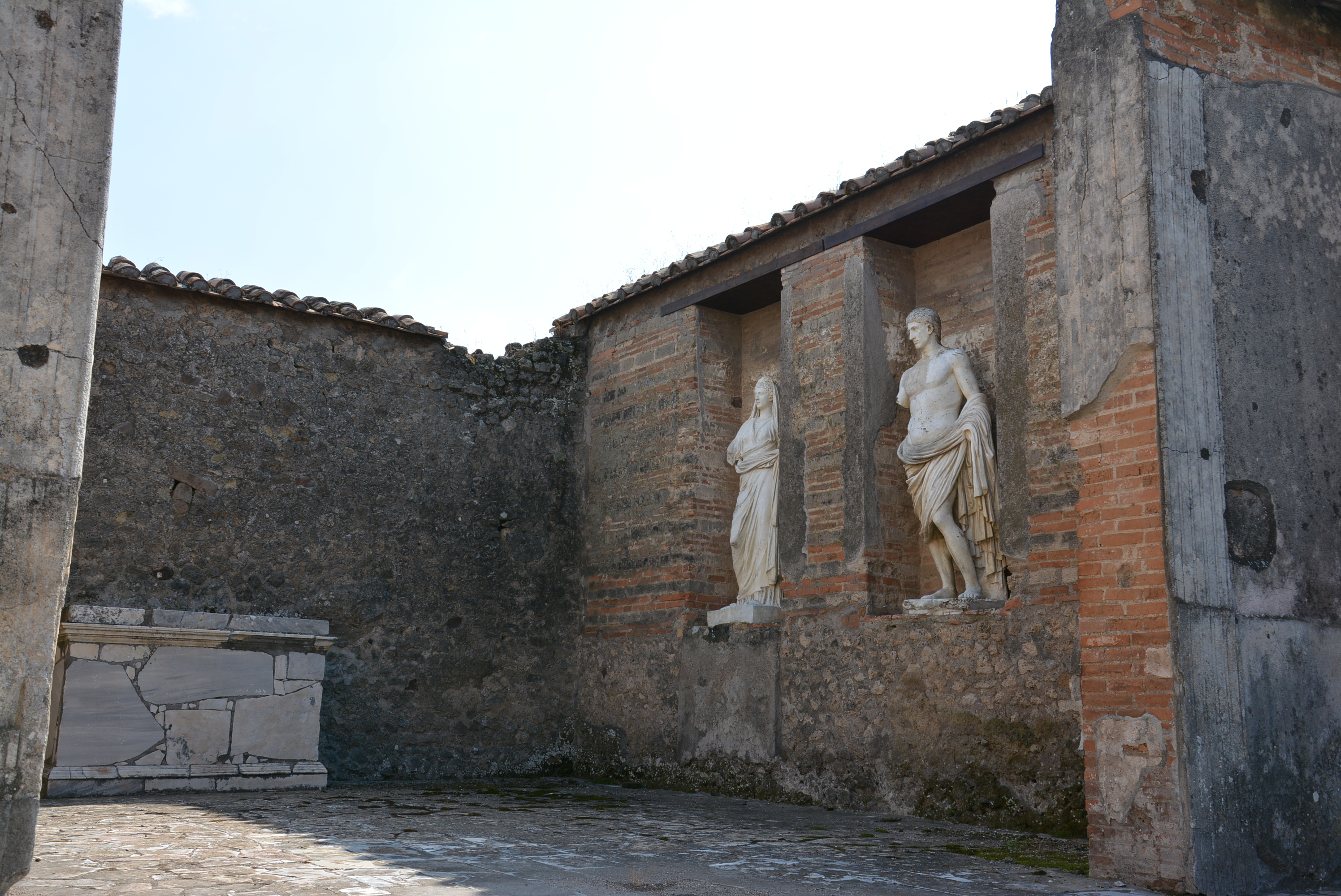 Ingresso secondario - MIBACT This is a photo of a monument which is part of cultural heritage of Italy.